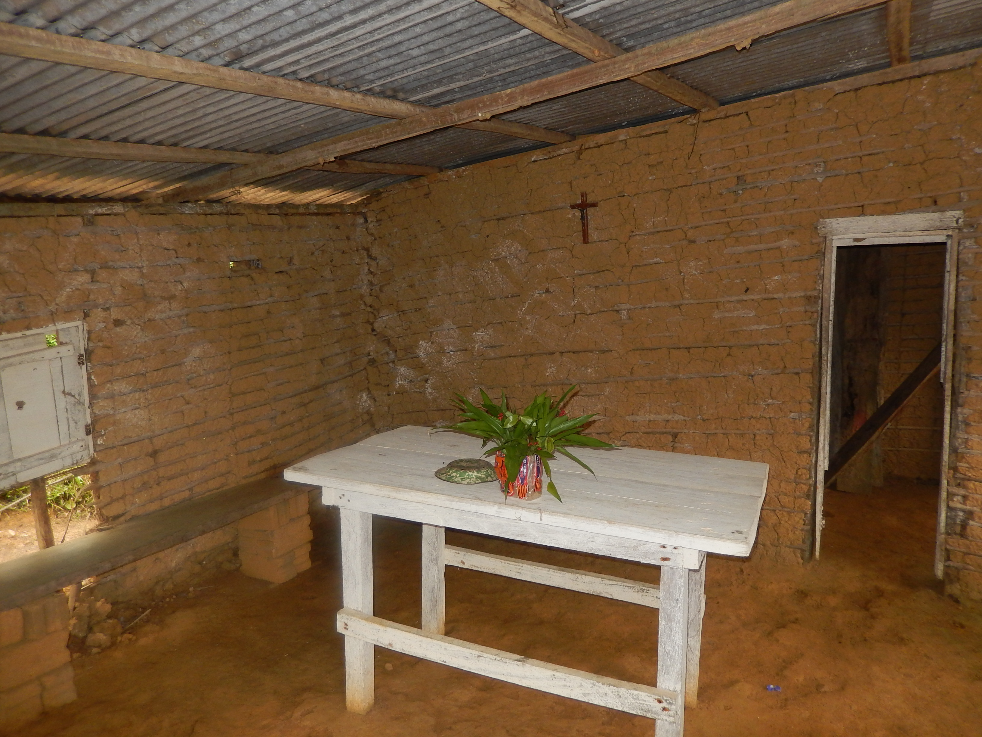 Église catholique de Tayap (Cameroun)